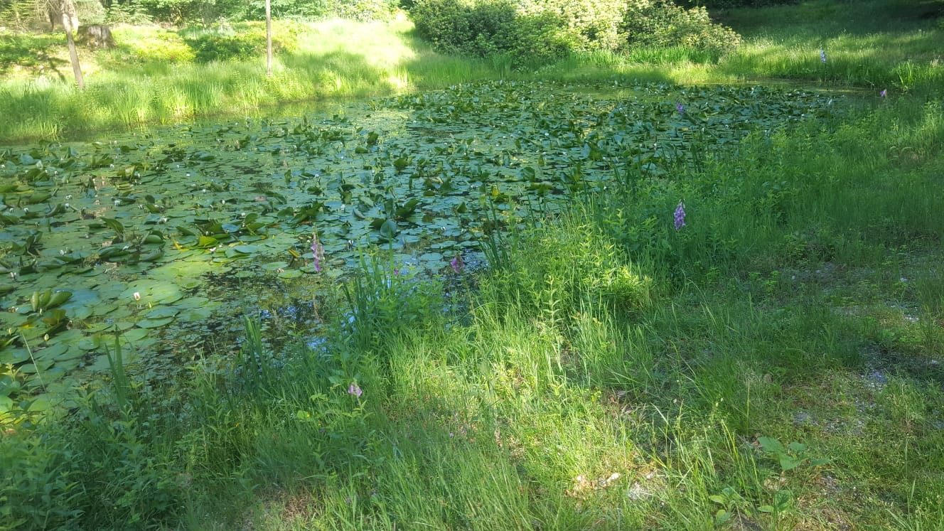 de leemkuil in landgoed Tongeren, 2018